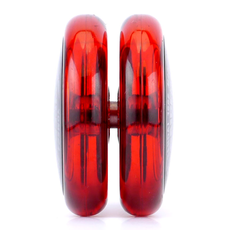 ハイパーレイダー側面。ルーピングプレイに向く。